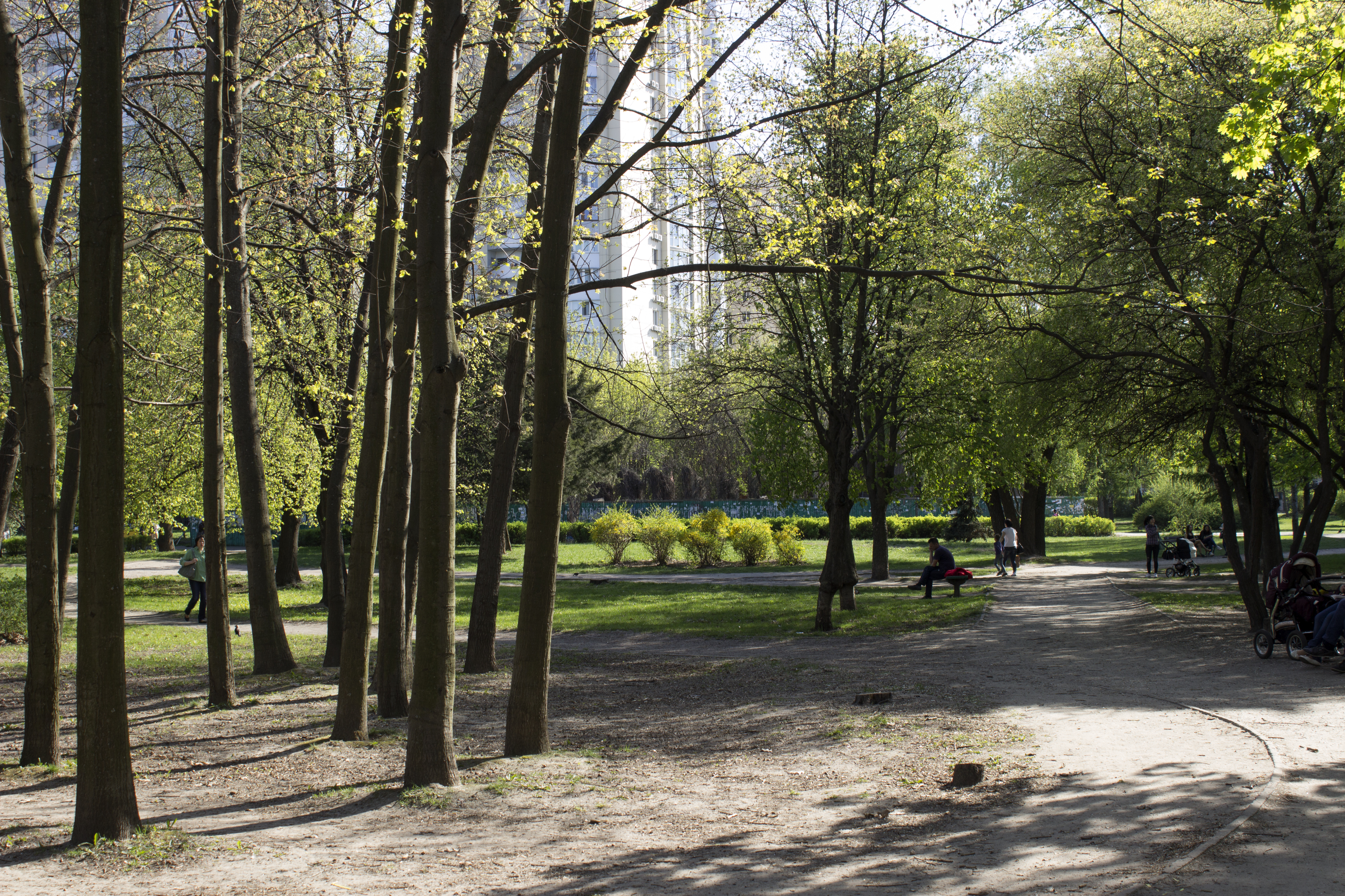 Парк «Юність», Святошинський район, перетин вул. Картвелішвілі та просп. Леся Курбаса у Святошинському районі